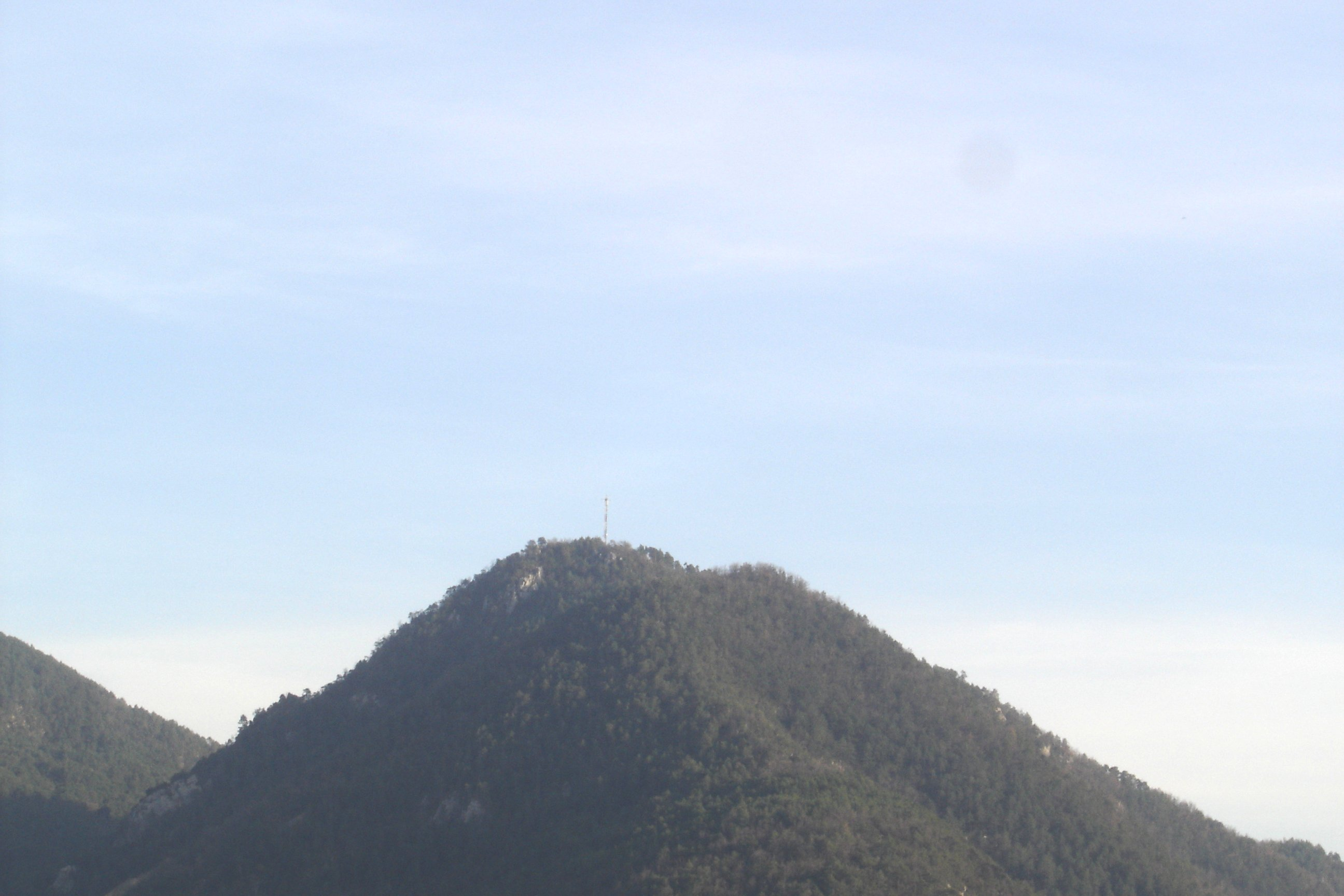 Els dos cims del Serrat del Jou (La Coma i la Pedra, la Vall de Lord, Solsonès) vist des de la sortida de la Coma en direcció a Sant Llorenç de Morunys (vessant nord).